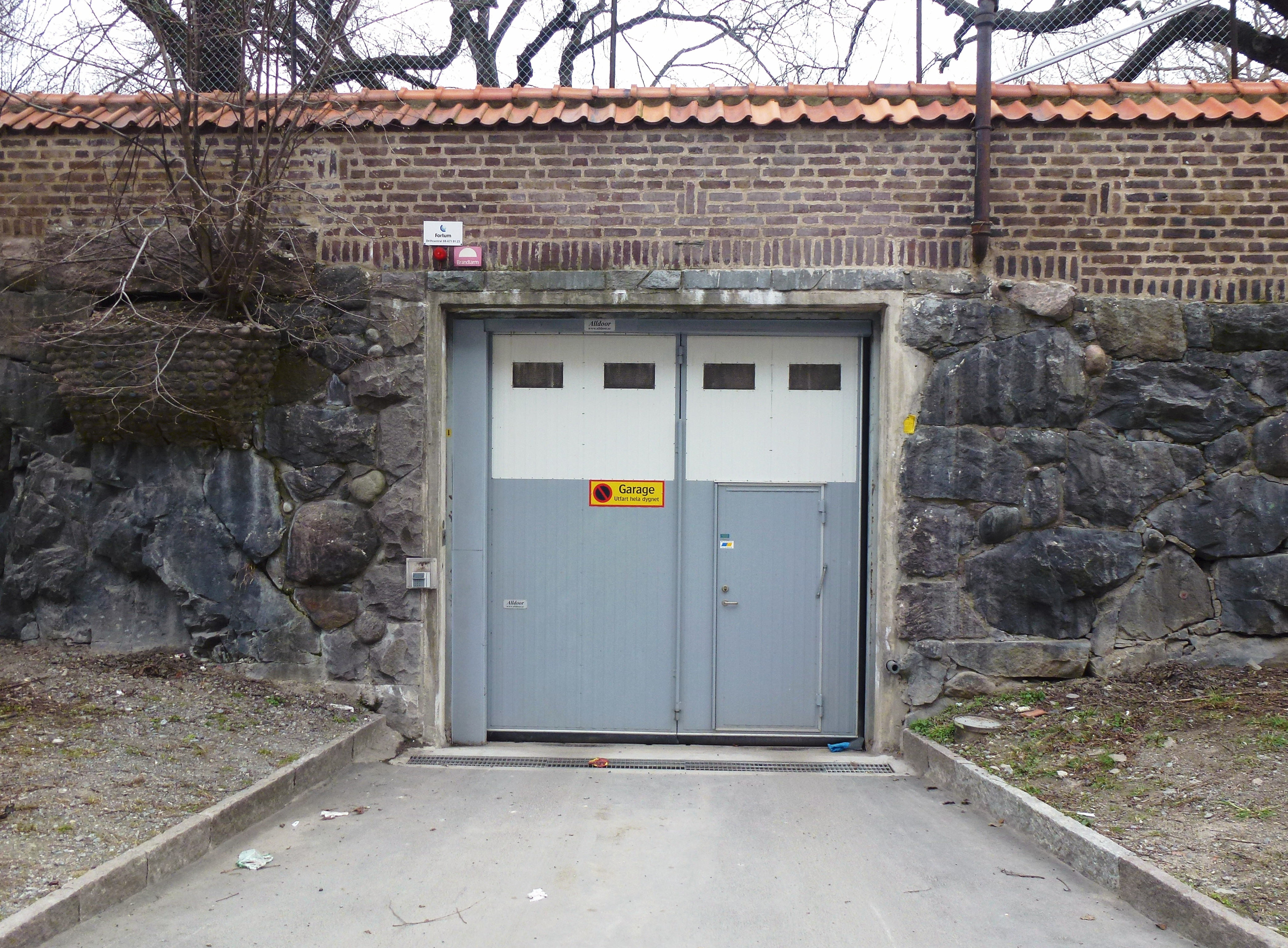 Ingång till f.d. ledningscentralen "Maskrosen" under Östra Reals skolgård